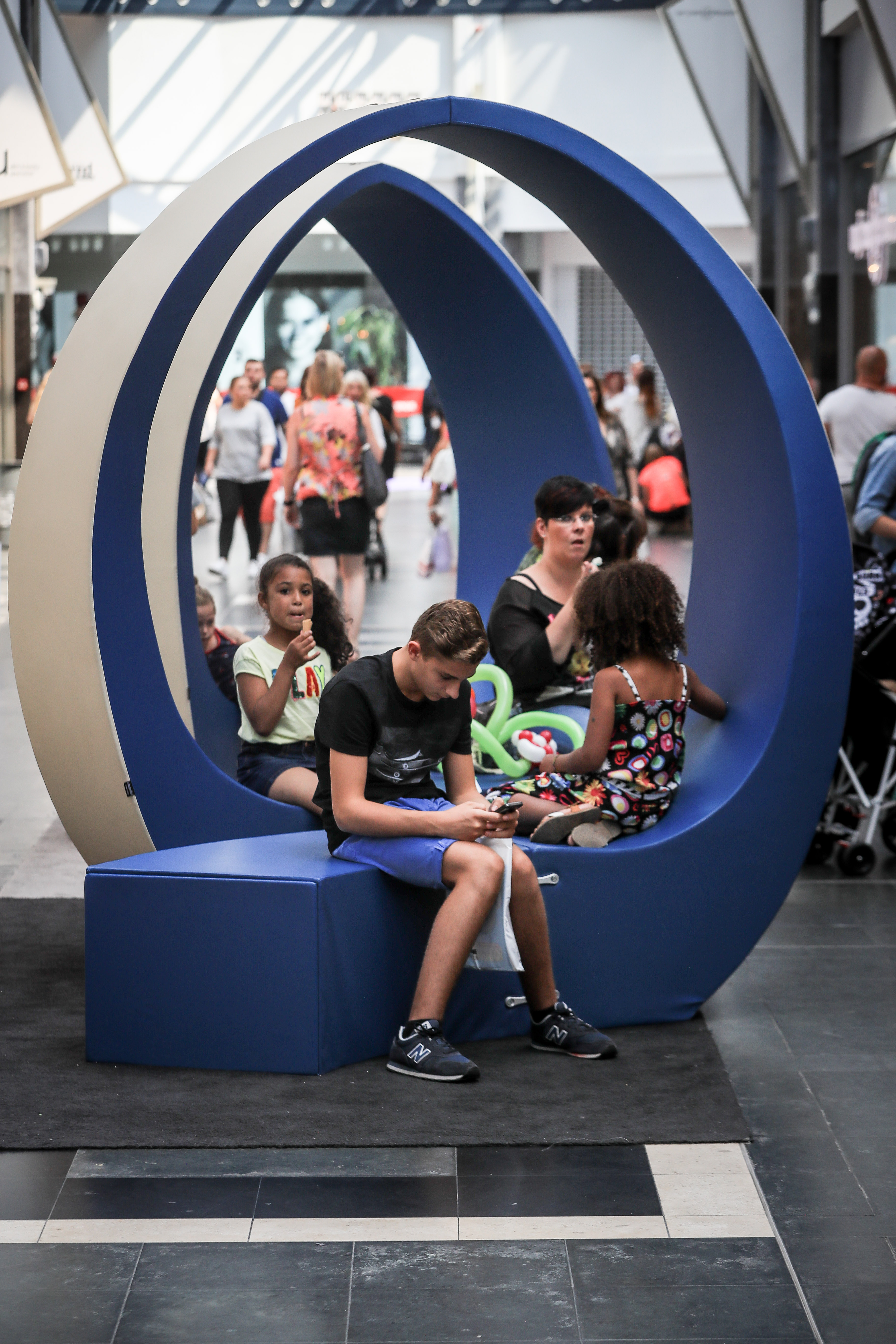 Espace enfants